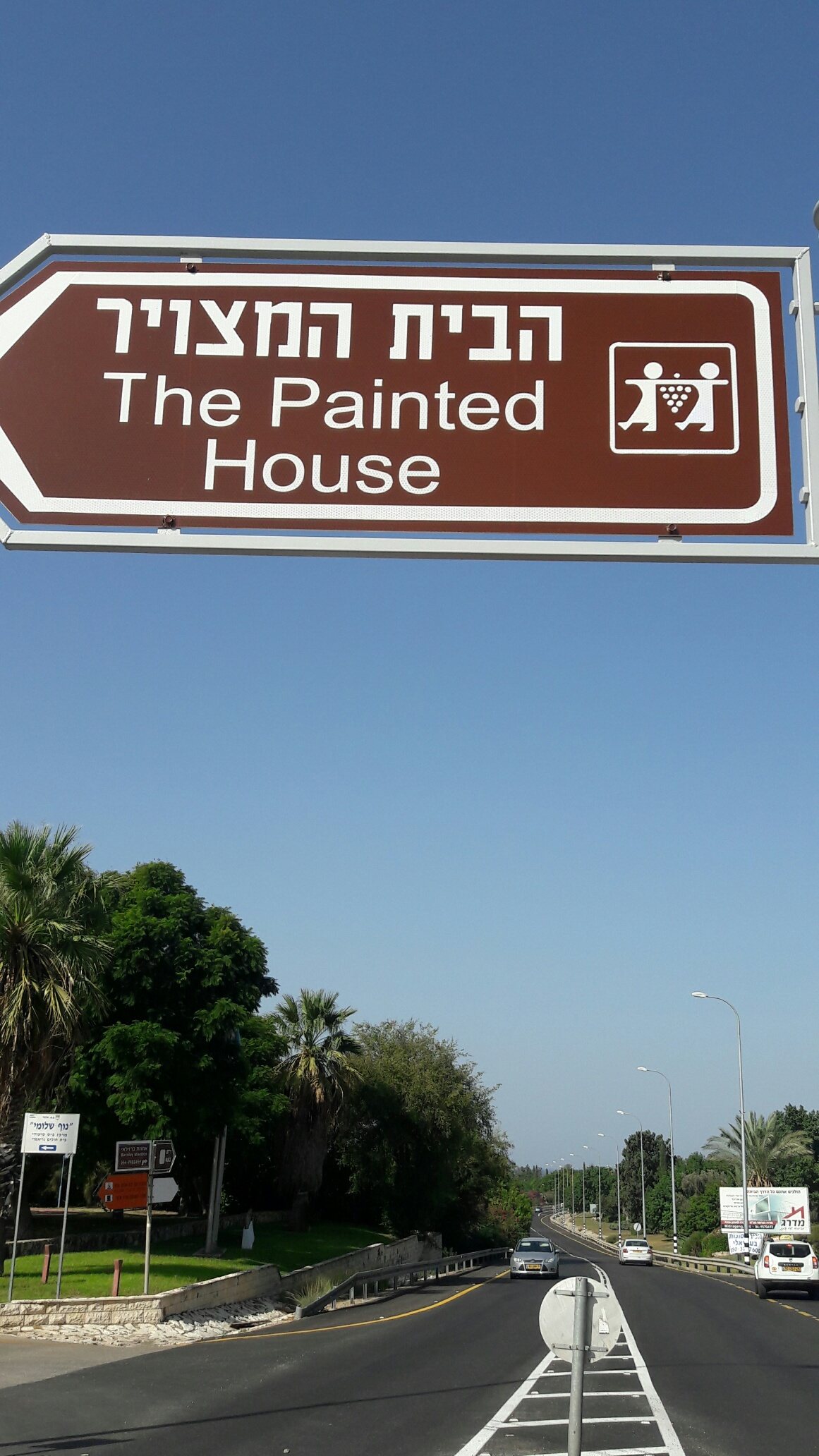 שלט הכוונה אל הבית המצוייר בשלומי - ביתה של עפיה זכריה